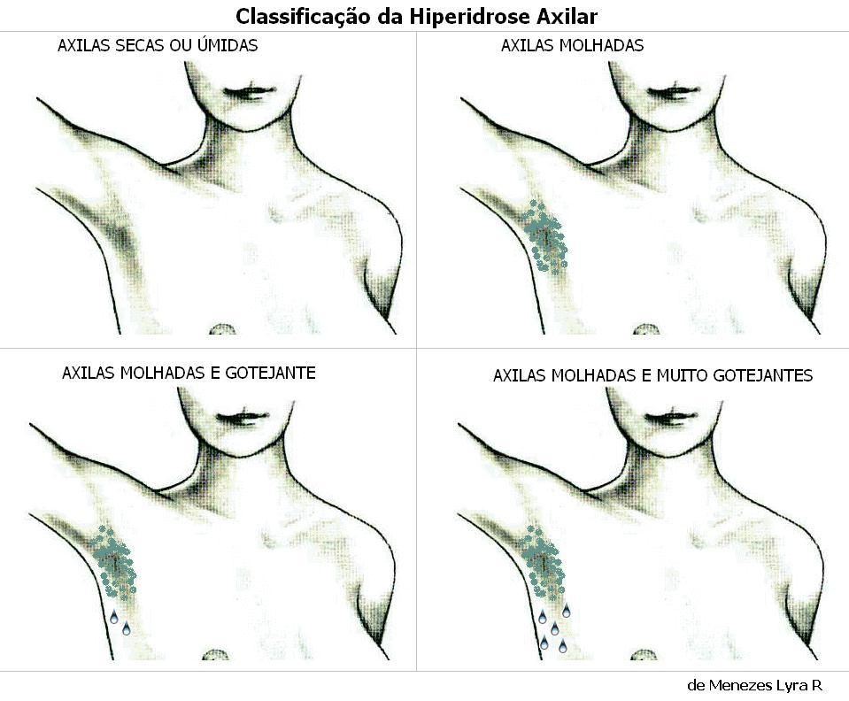 Classificação da hiperidrose axilar